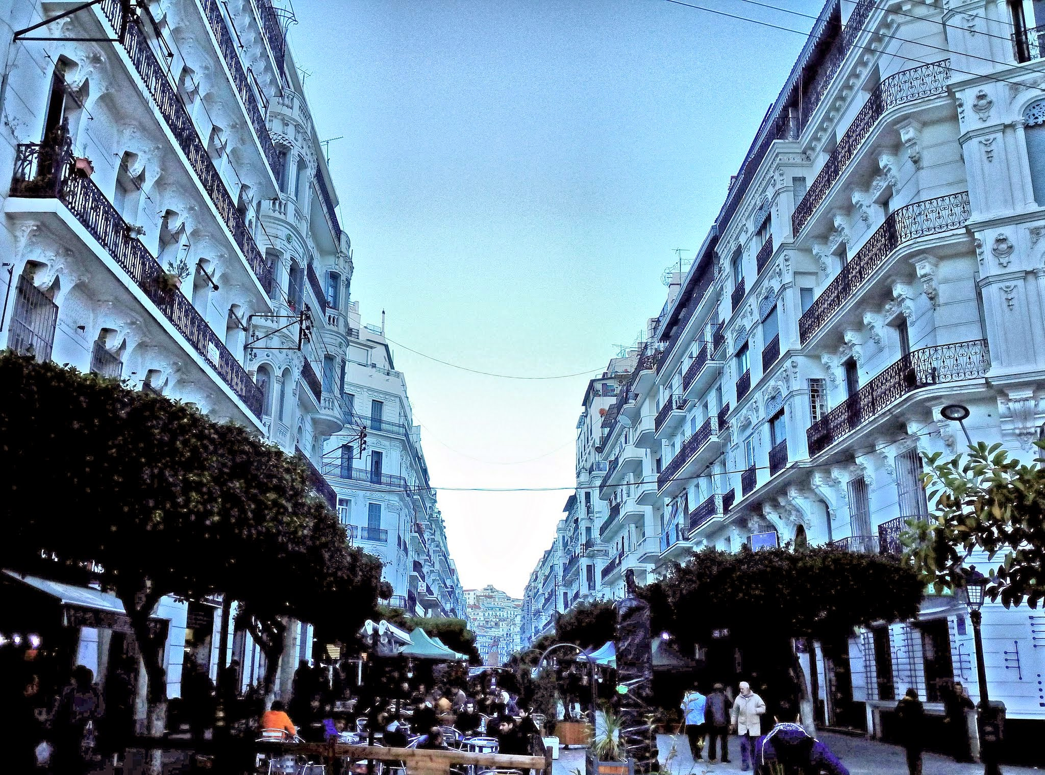 Alger Centre, Algeria